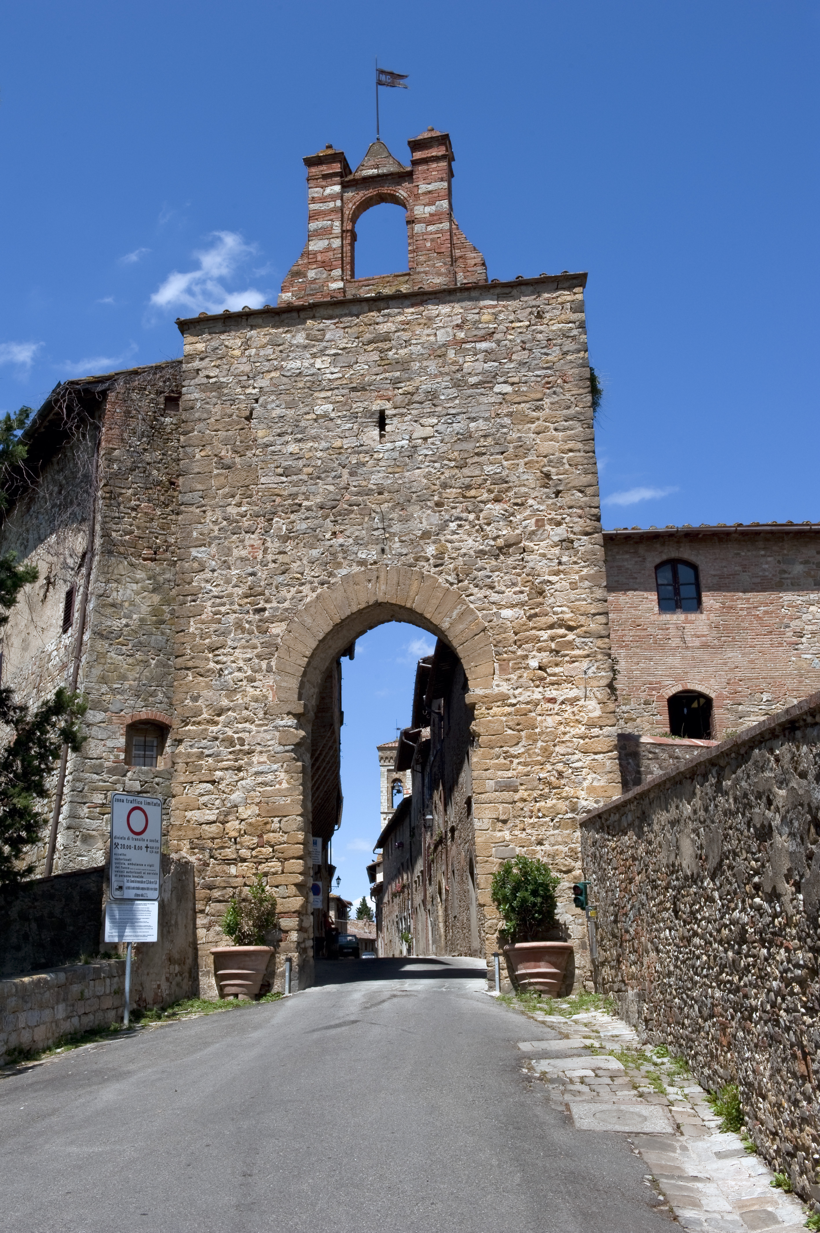 Porta Senese a Barberino Val d'Elsa